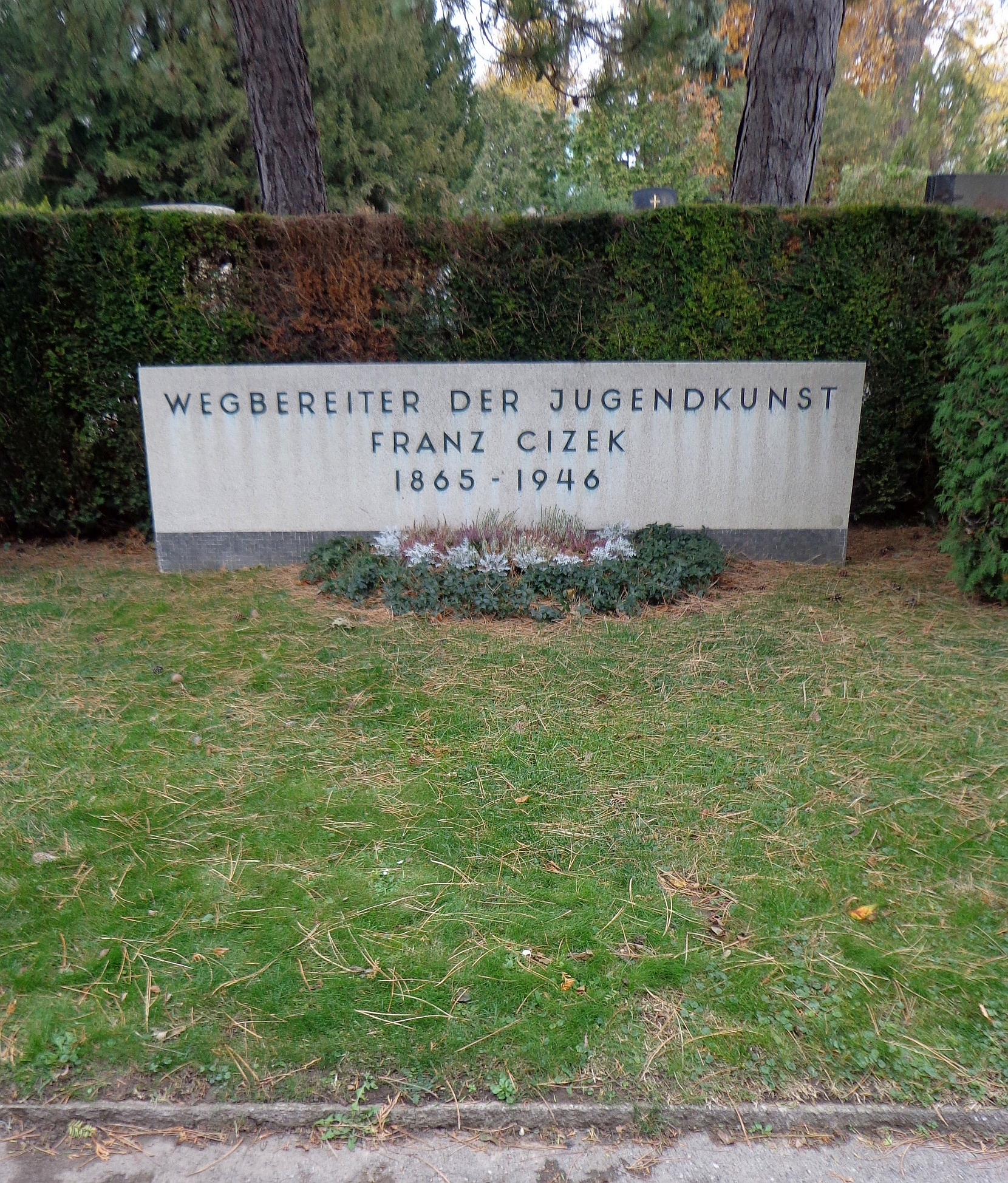 Wiener Zentralfriedhof - Gruppe 14 C, Ehrengrab von Franz Čižek